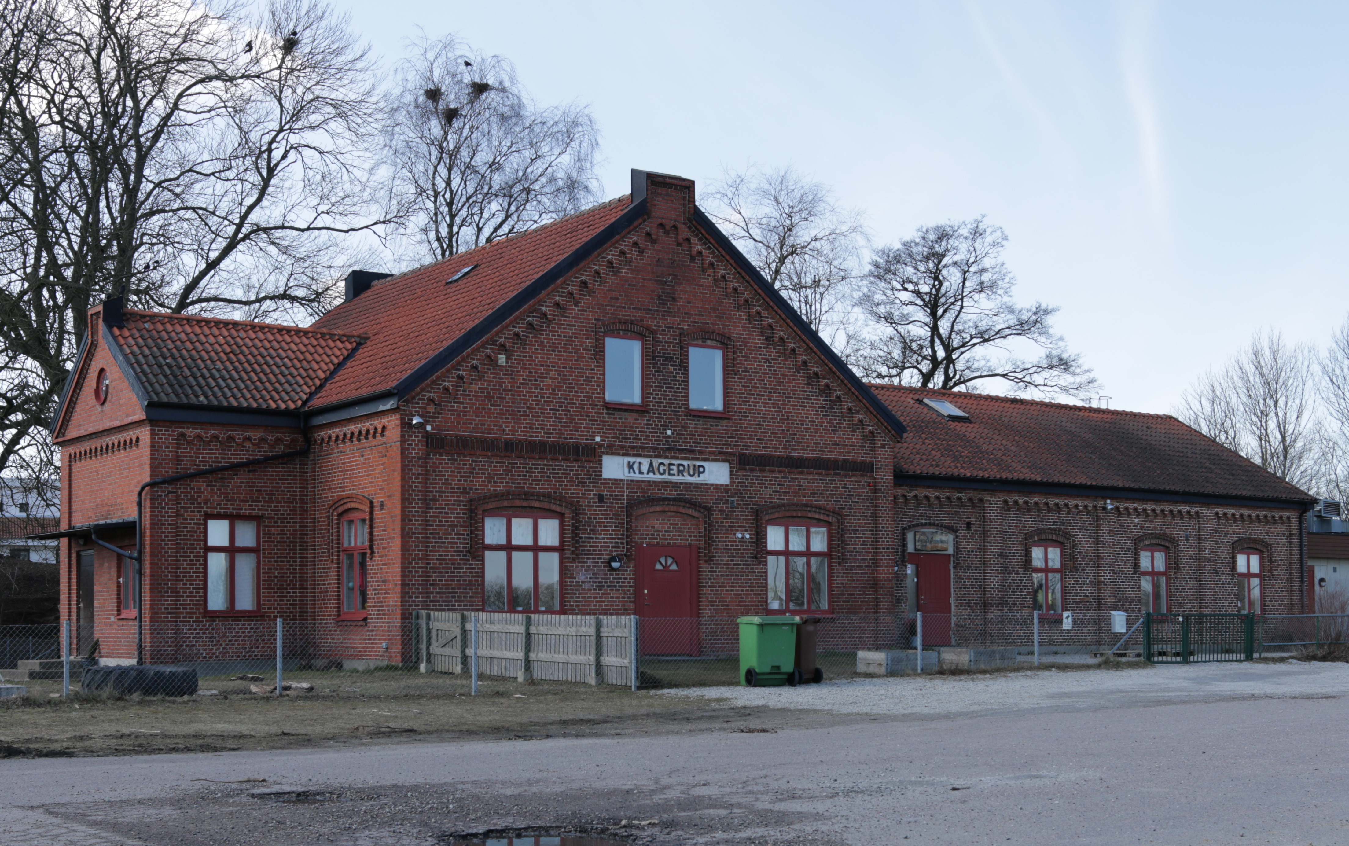 Klågerups station